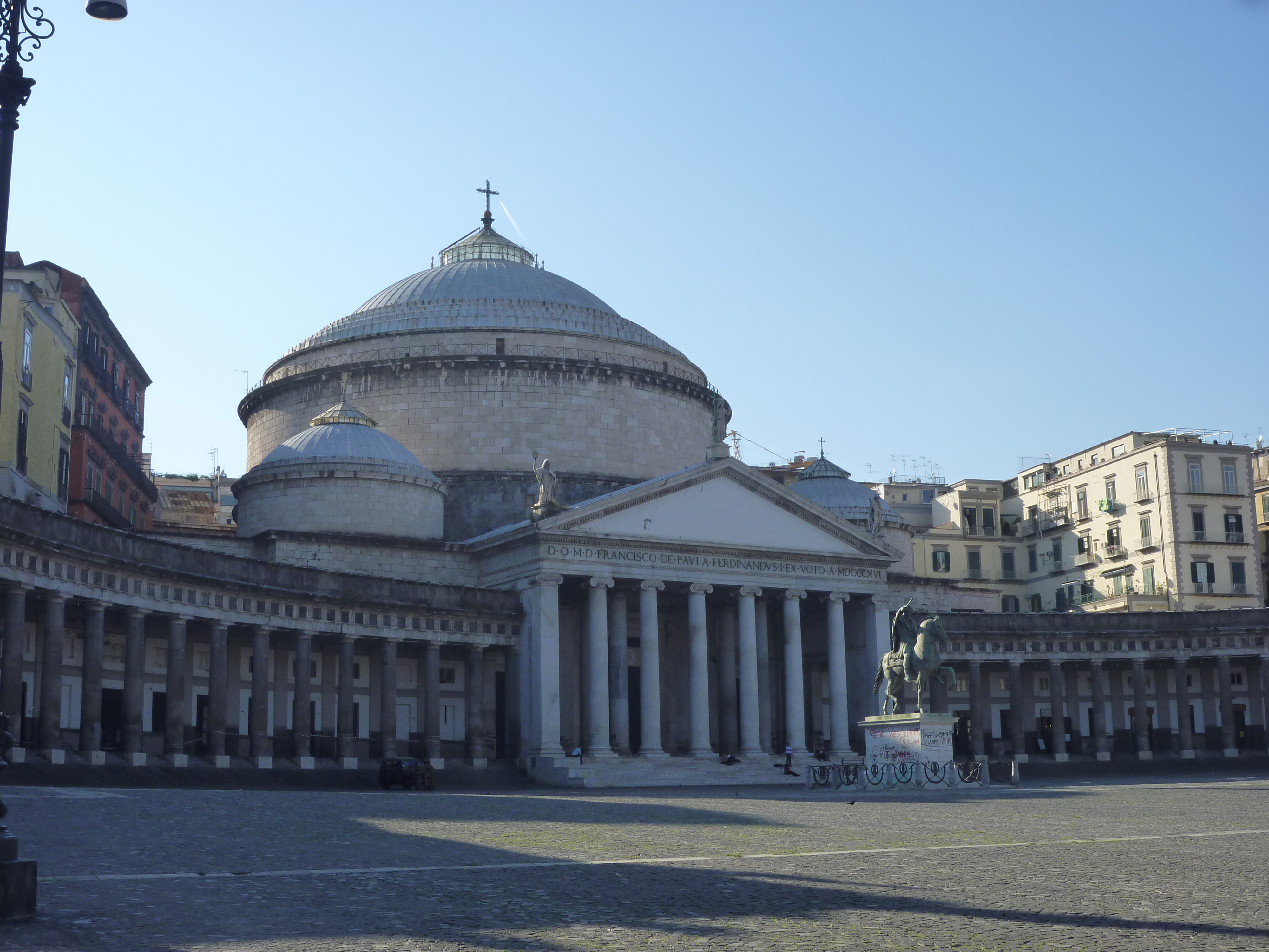 Naples, summer 2012